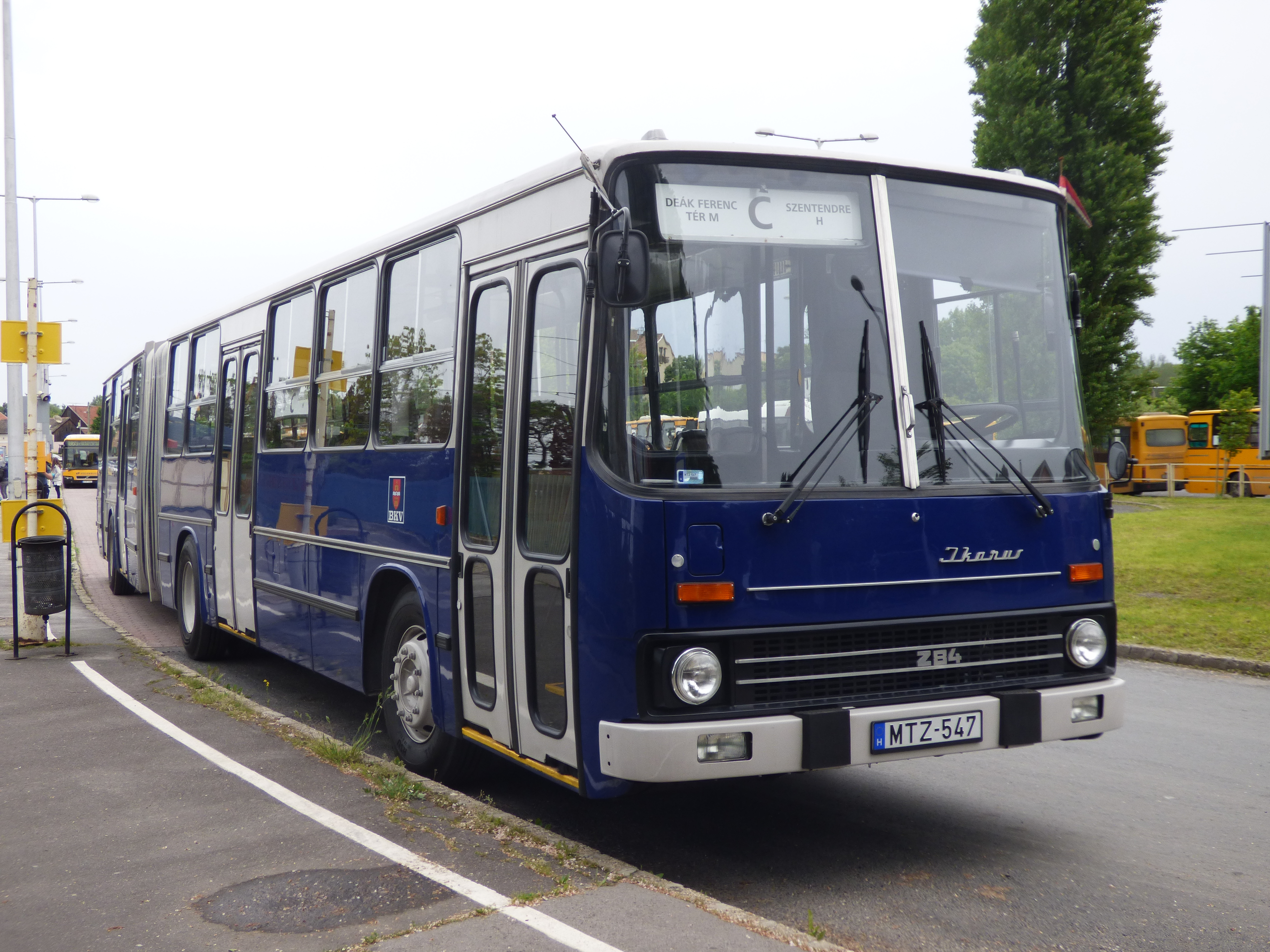 Ikarus 284-es busz Szentendrén